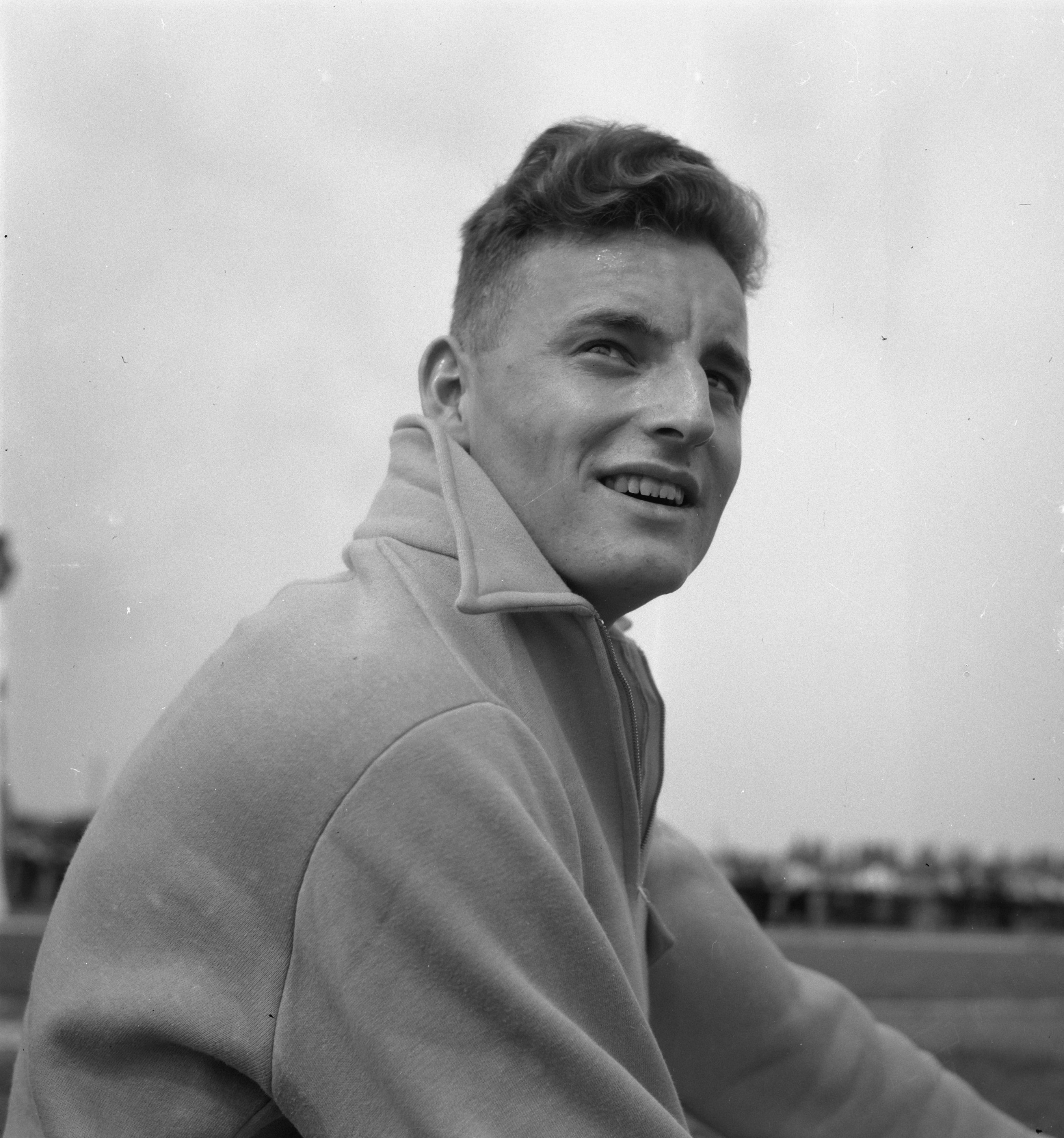 Collectie / Archief : Fotocollectie Anefo Reportage / Serie : [ onbekend ] Beschrijving : Atletiekcracks Saat 100 meter Datum : 6 augustus 1950 Trefwoorden : atletiek Fotograaf : Pot, Harry / Anefo Auteursrechthebbende : Nationaal Archief Materiaalsoort : Negatief (zwart/wit) Nummer archiefinventaris : bekijk toegang 2.24.01.03 Bestanddeelnummer : 904-1150